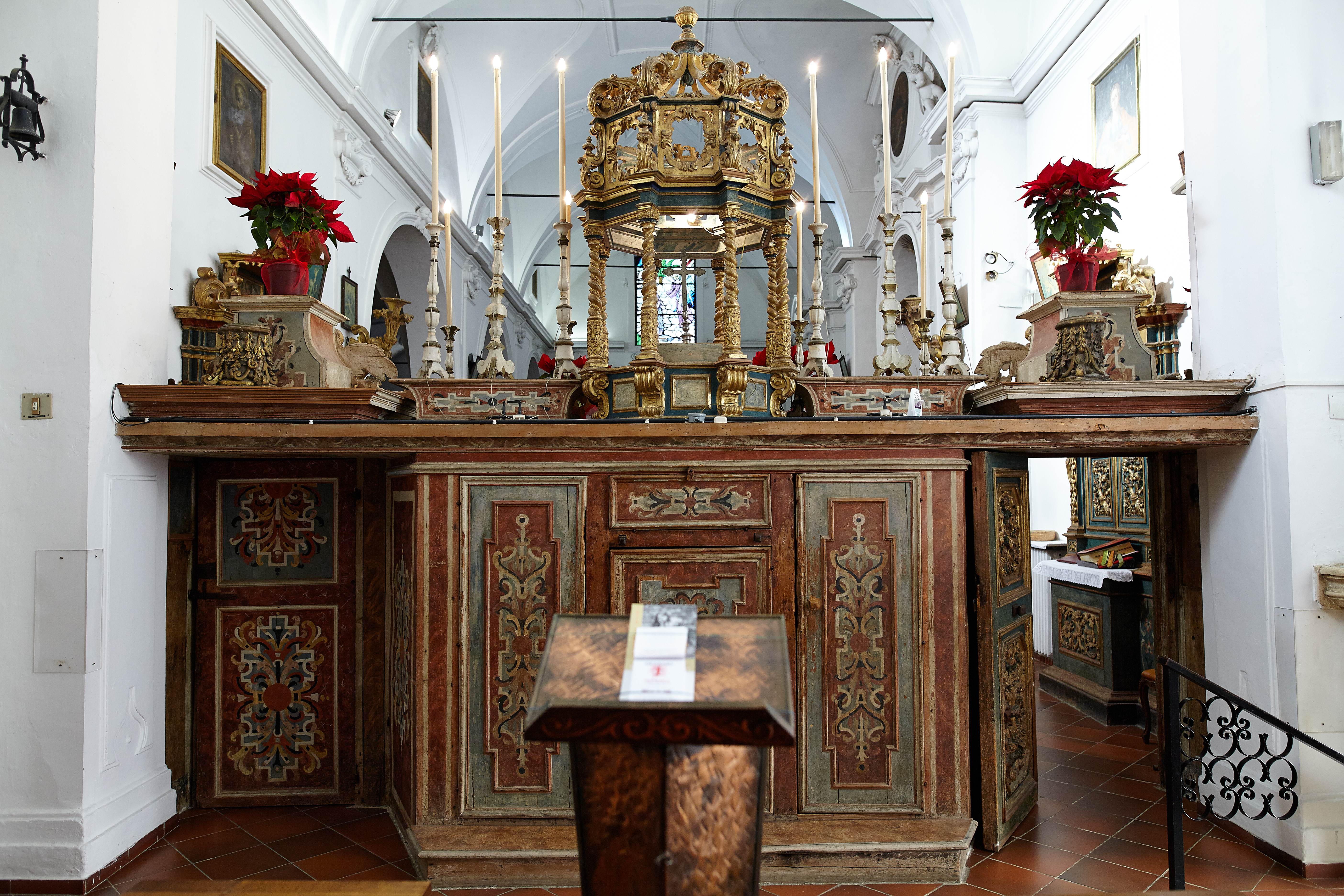 Istituto Sant'Onofrio (ex convento) This is a photo of a monument which is part of cultural heritage of Italy.